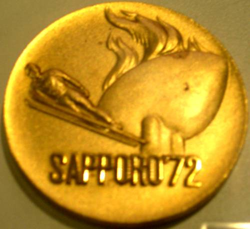 Olympische Winterspiele 1972 - Erinnerungsmedaille. Eigenes Foto, gemacht im Thüringer Wintersportmuseum in Oberhof.